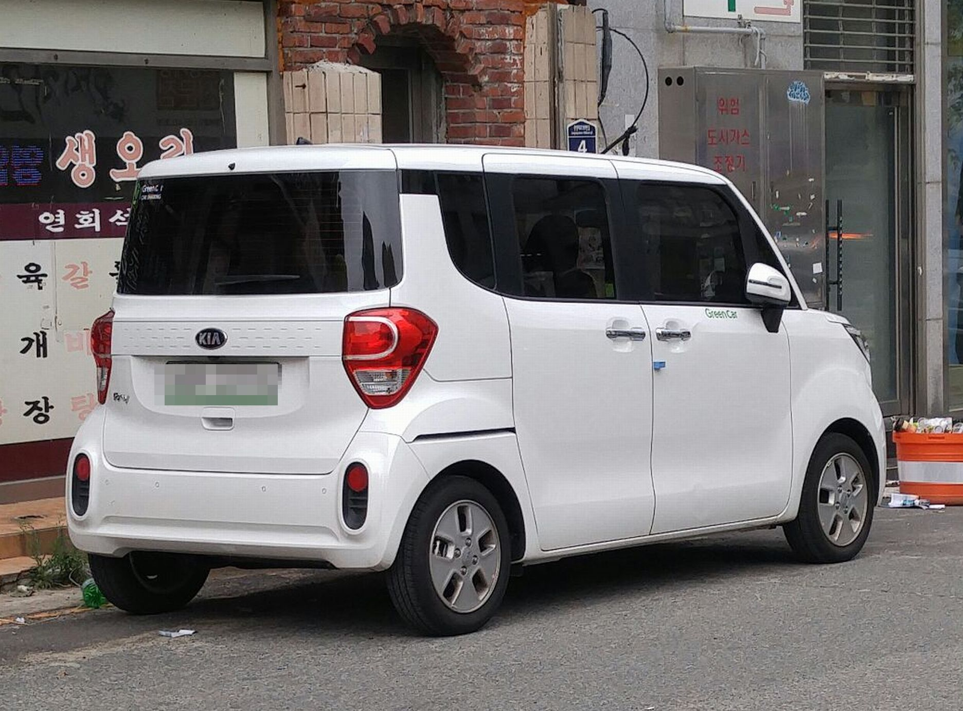 キア・レイ